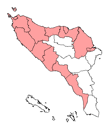 Peta kabupaten di Aceh yang berbahasa Aceh dengan pengecualian kabupaten Aceh Timur (3 kecamatan berbahasa Gayo), Aceh Barat Daya (1 kecamatan berbahasa Aneuk Jamee) dan Aceh Selatan (5 kecamatan berbahasa Aceh)